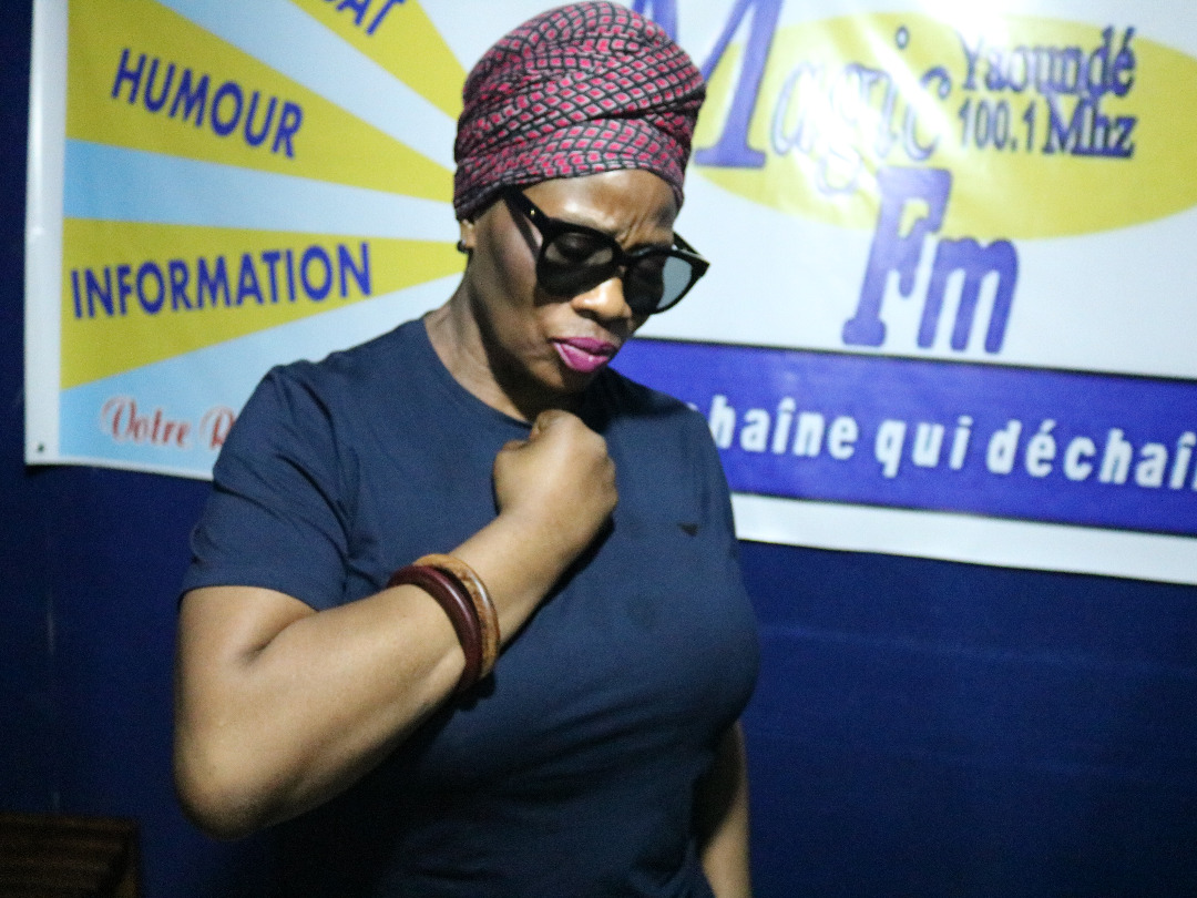 L'artiste K-Tino en 2018 dans "La Grosse Emission" sur Magic FM, lors sa tournée média pour présenter son single Wata Fufu.